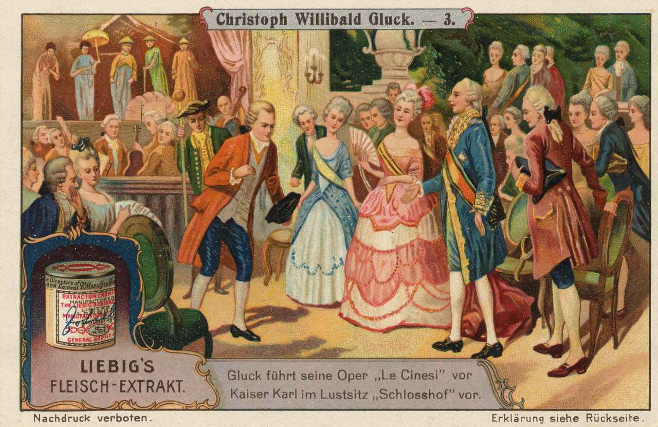 3: Gluck führt seine Oper »Le Cinesi« vor Kaiser Karl im Lustsitz »Schlosshof« auf. In Rom, damals der eigentlichen Heimat und Bildungsstätte seiner Kunst, entfaltete sich Gluck's Genius, und bald schuf er die Oper »Telemaco«, die seinen Ruhm immer weiter ausbreitete. Sein Wanderleben setzte er vorläufig fort, und so finden wir ihn 1754, nachdem er bis nach Stockholm gekommen war, wieder in Wien. Hier hatte ihn Feldmarschall Prinz Joseph Friedrich an den Hof des Kaisers gebracht. Auf dem Lustsitze des Prinzen »Schlosshof« wurde sein Festspiel »Le Cinesi« in Anwesenheit des kaiserlichen Hofes aufgeführt. Dieses Werk wurde später auch im Hoftheater gegeben und Gluck wurde als Kapellmeister mit 2000 Gulden Gehalt fest angestellt.